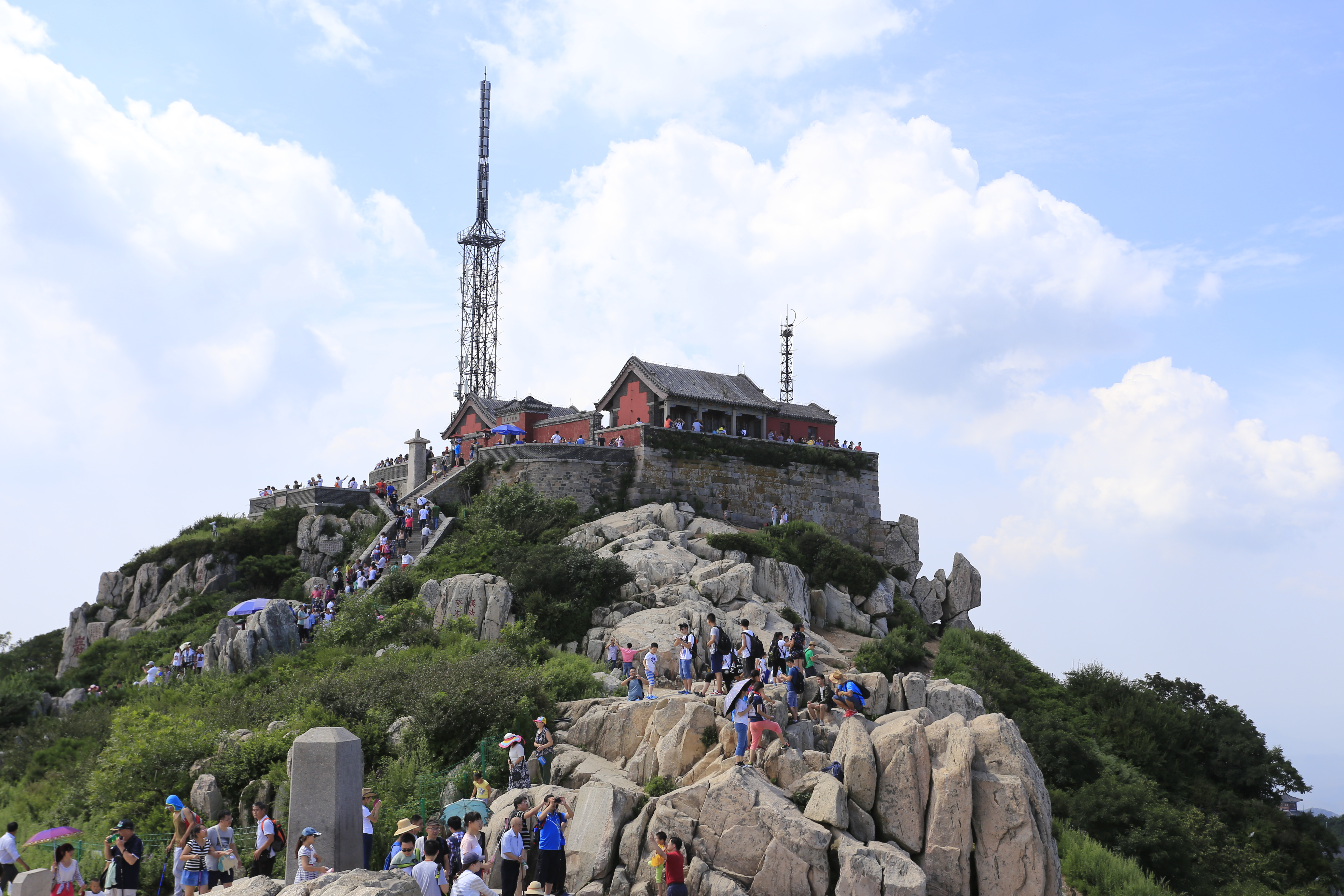 泰山 玉皇顶